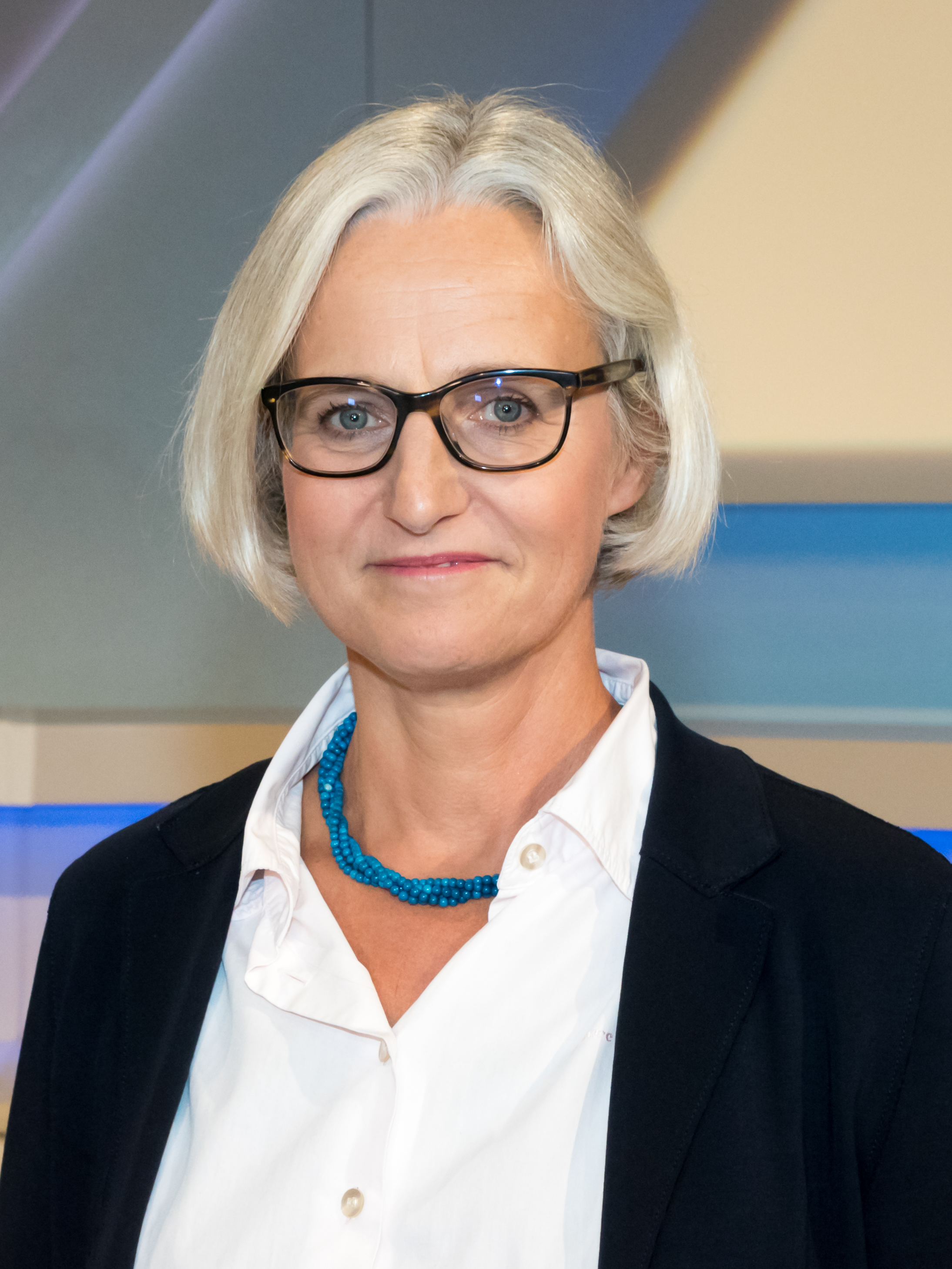 „maischberger. die woche“ am 13. November 2019 in Köln. Produziert vom WDR. Foto: Christiane Hoffmann („Spiegel“-Autorin)